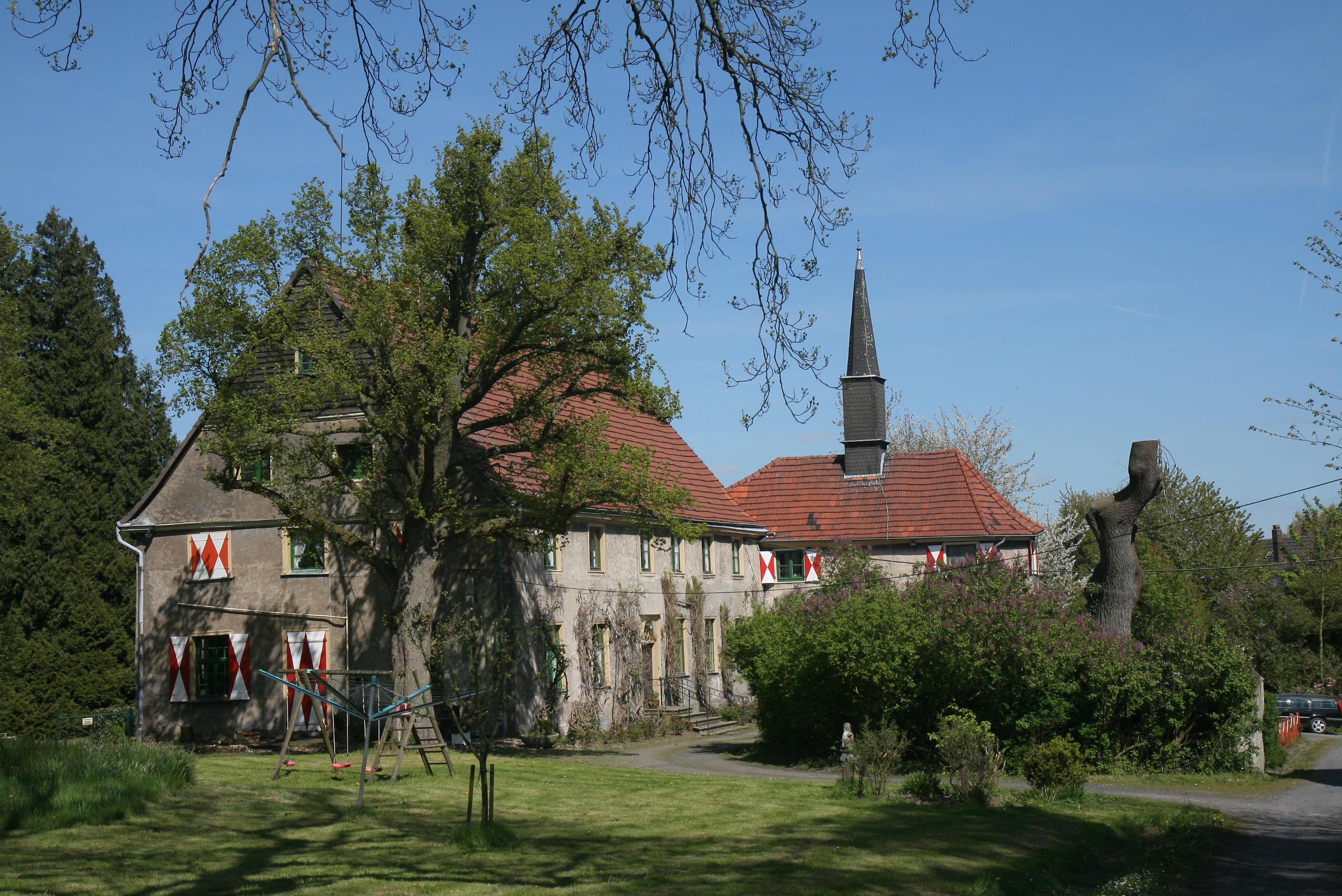 Gut Schafhausen, Schafhauser Weg 24 in Wickede-Schlückingen. This image shows a heritage building in Germany, located in the North Rhine-Westphalian city Wickede (Ruhr) (no. 3).